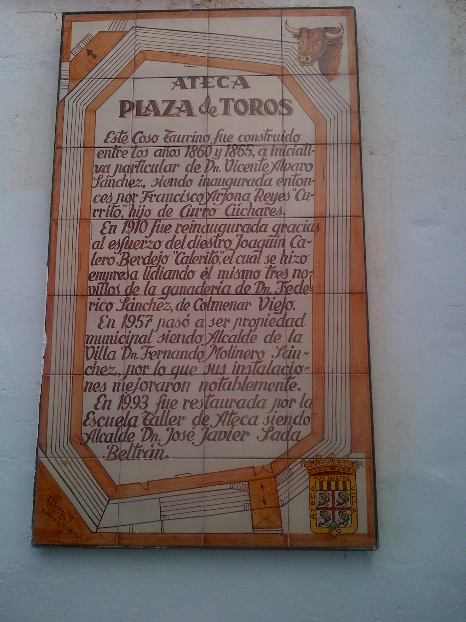 Azulejo conmemorativo en la Plaza de toros de Ateca